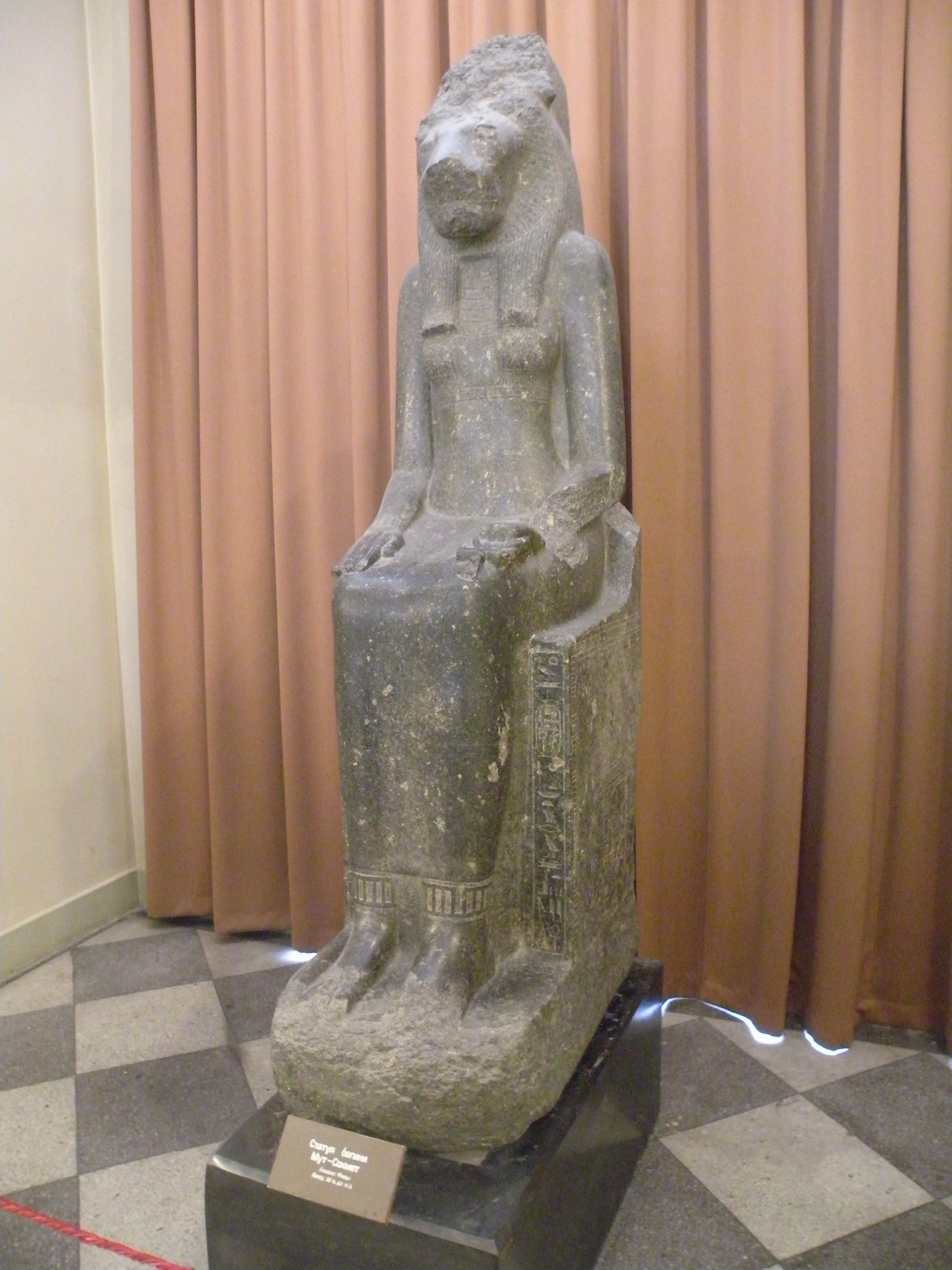 Egyptian antiquities in Hermitage Museum